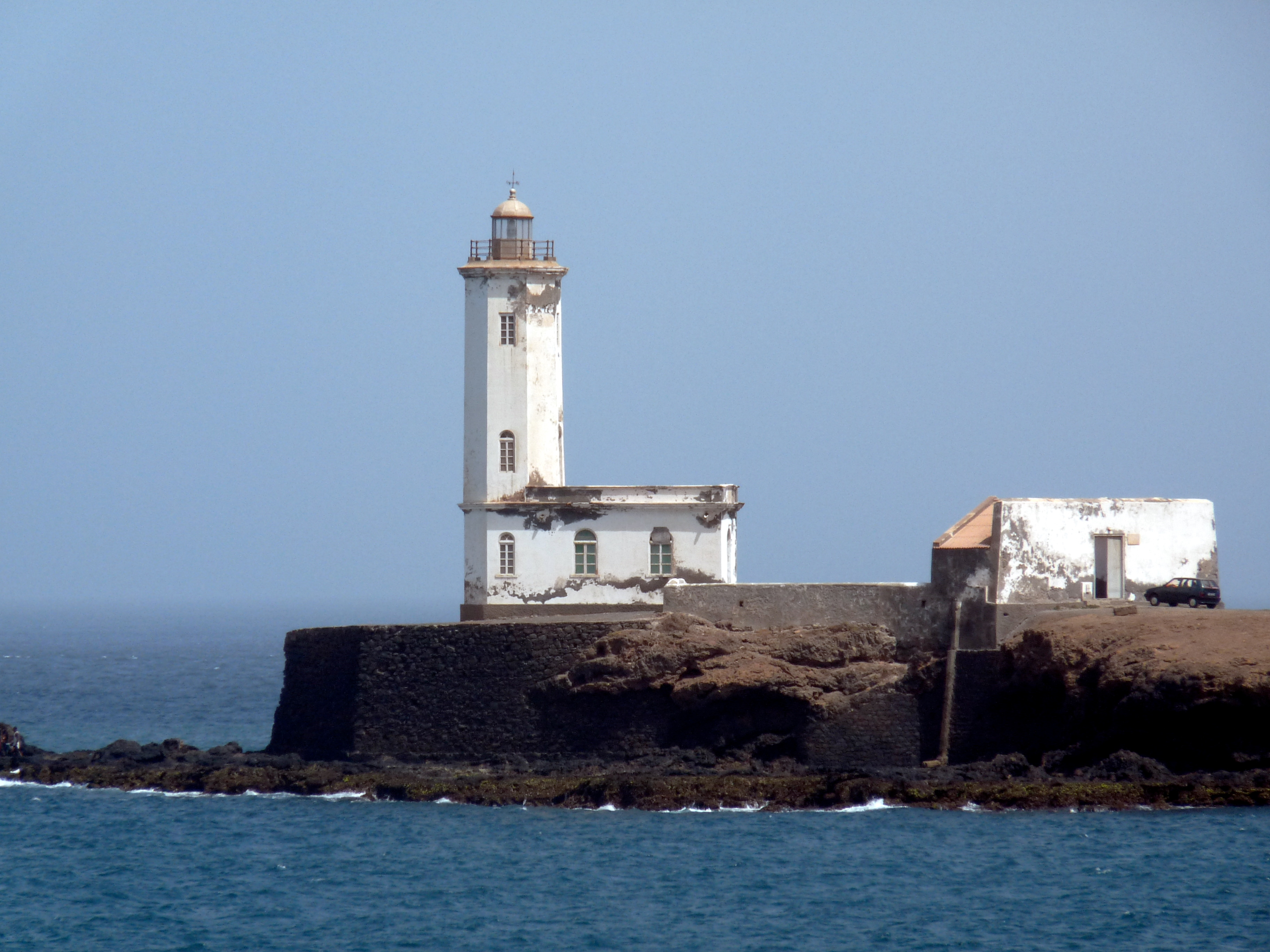 Farol D. Maria Pia. Cidade da Praia - Ilha de Santiago - Cabo Verde